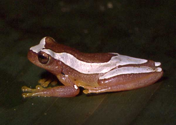 Dendropsophus elegans